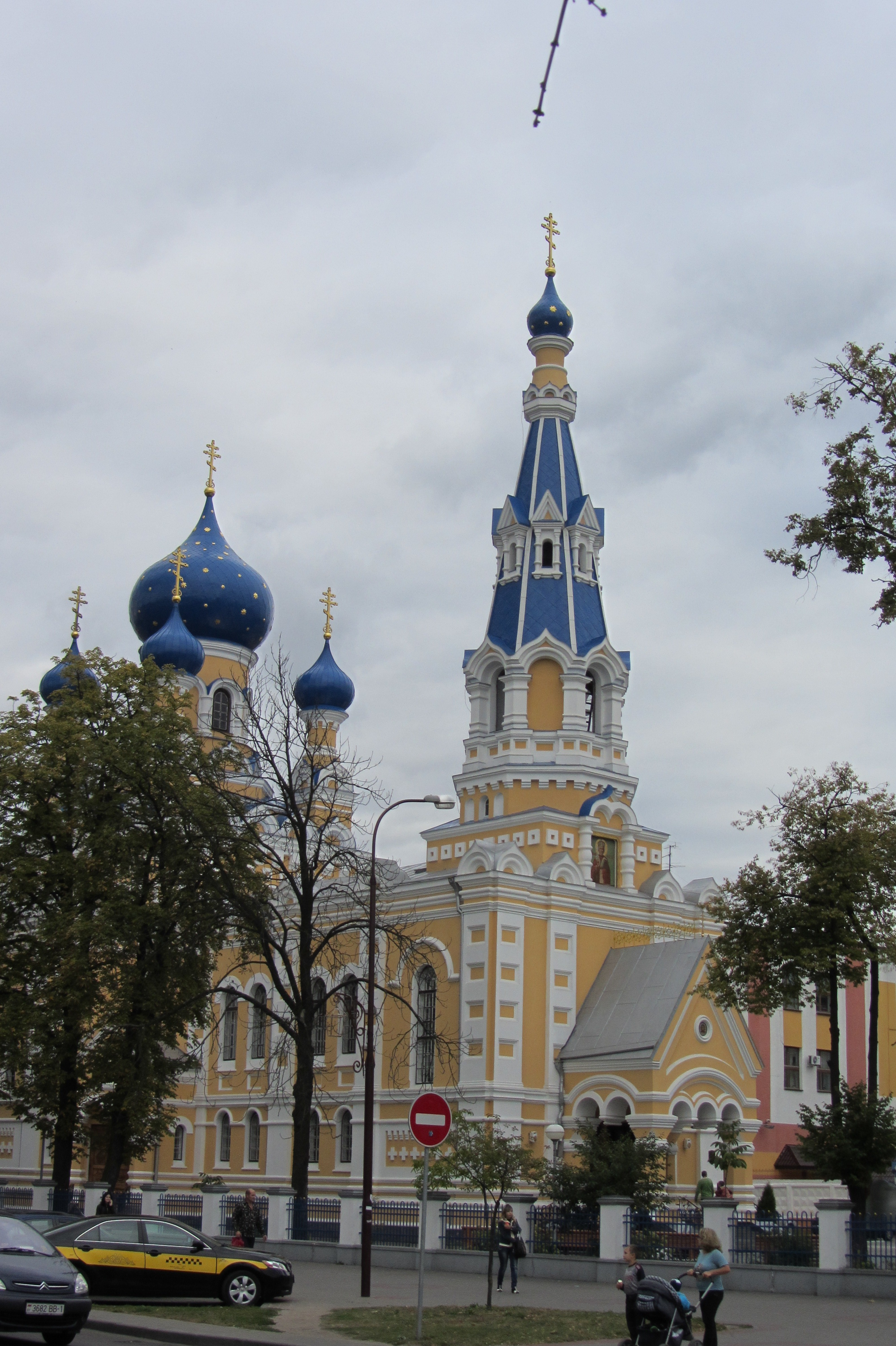 Беларуская (тарашкевіца): Сьвята-Мікалаеўская брацкая царква. г. Берасьце This is a photo of Belarusian heritage monument. Reference number: 113Г000021 ( WLM)